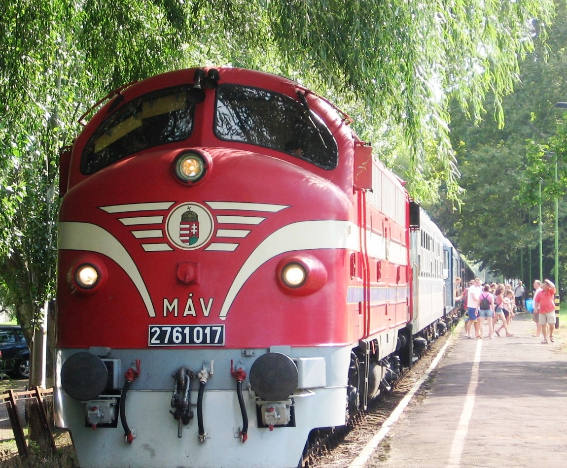 A 17-es Nohab egy menetrend szerinti személyvonat élén 2014.08.03.-án Badacsony állomásnál. Ekkorra a többi MÁV mozdonyhoz hasonlóan lecserélték a megszokott pályaszámrendszert. A Nohabok az M61 helyett a 2761 sorozatszámot kapták.